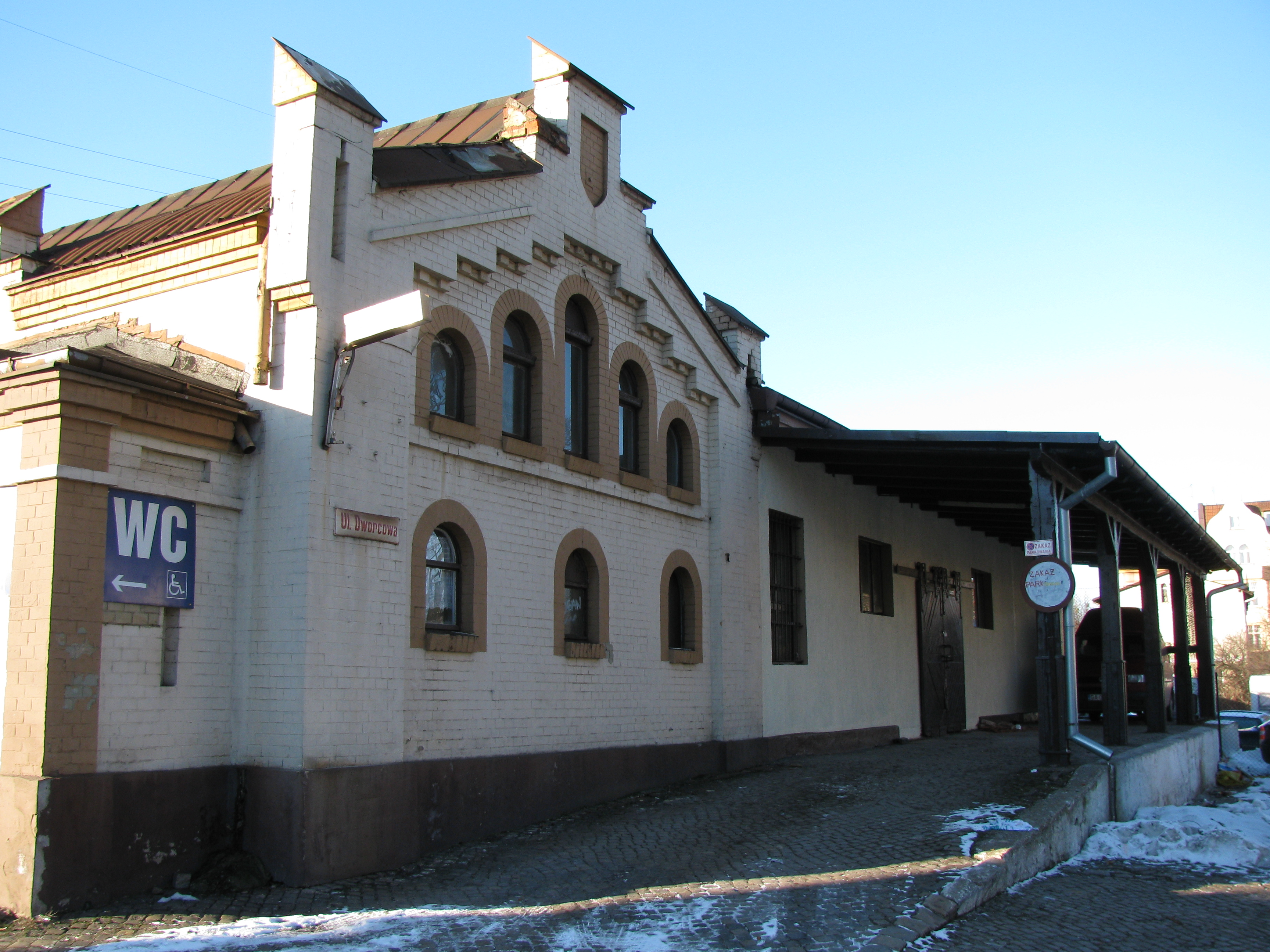 Sopot - neogotycki szalet z ok. 1870 r. przy dworcu kolejowym, najstarsze zabudowania dworca.